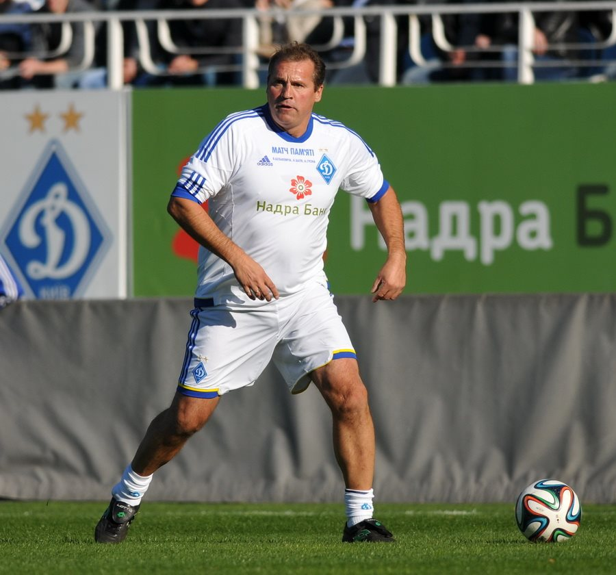 Матч пам'яті Белькевича, Баля і Гусіна